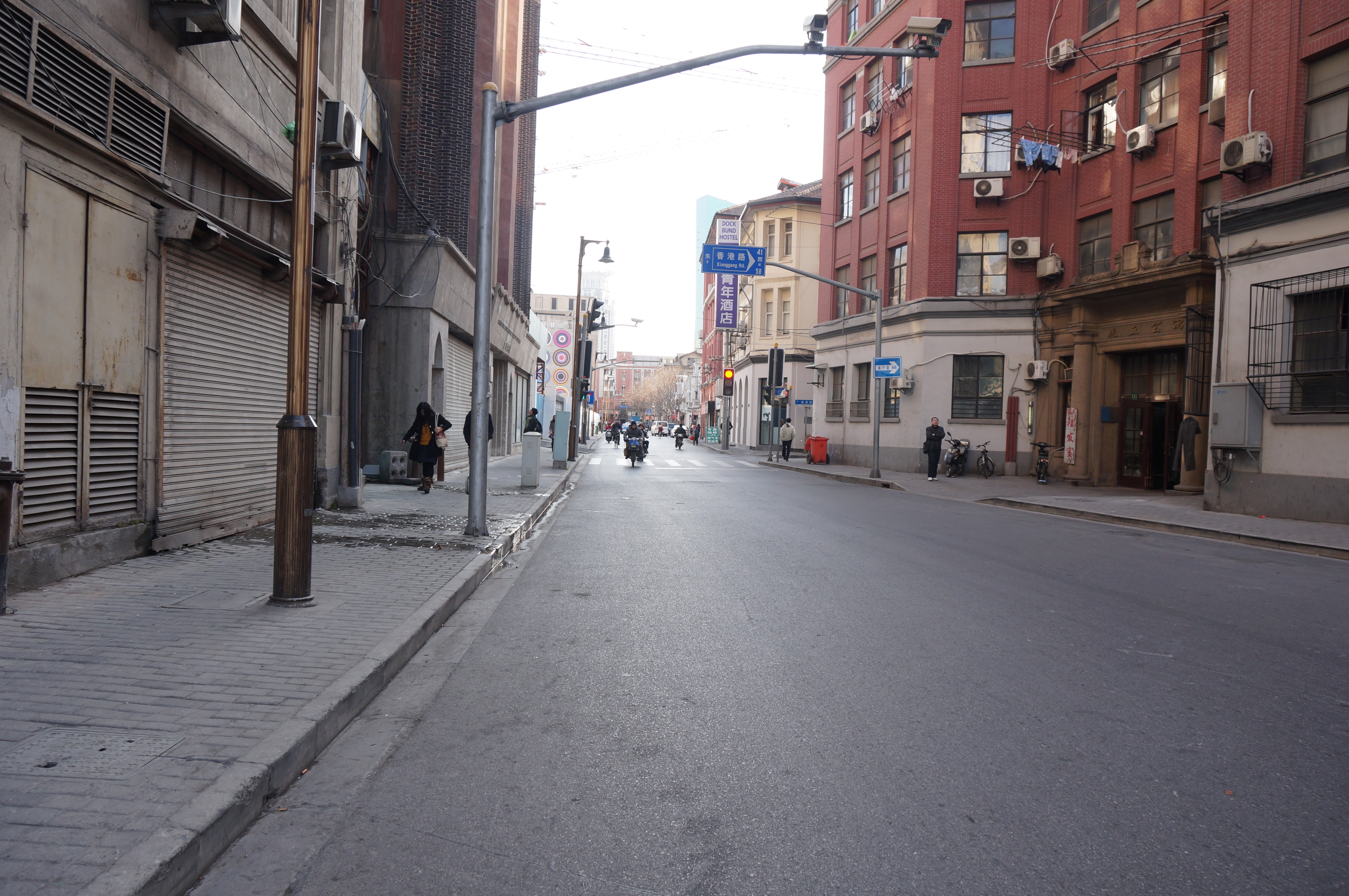 上海虎丘路街景